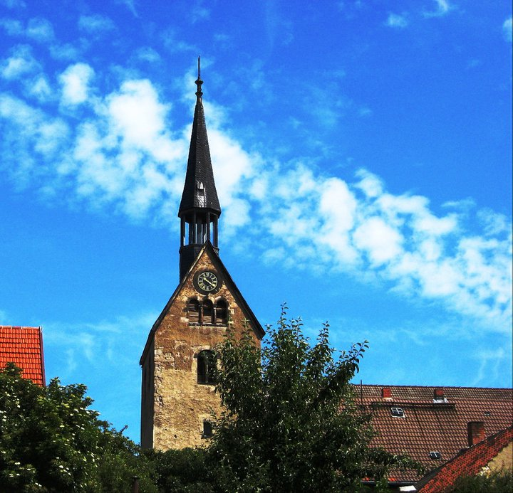 Die Kirche Warnstedt 2010